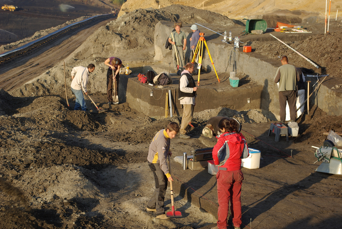 Archäologische Ausgrabung im Tagebau Schöningen an der Fundstelle 12